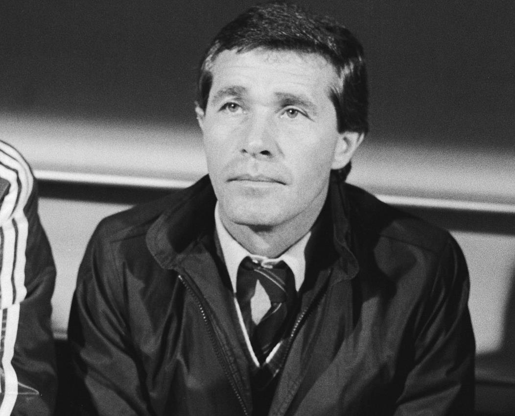 Nederland tegen Hongarije 1-2; Hongaarse trainer Gyorgy Mezey